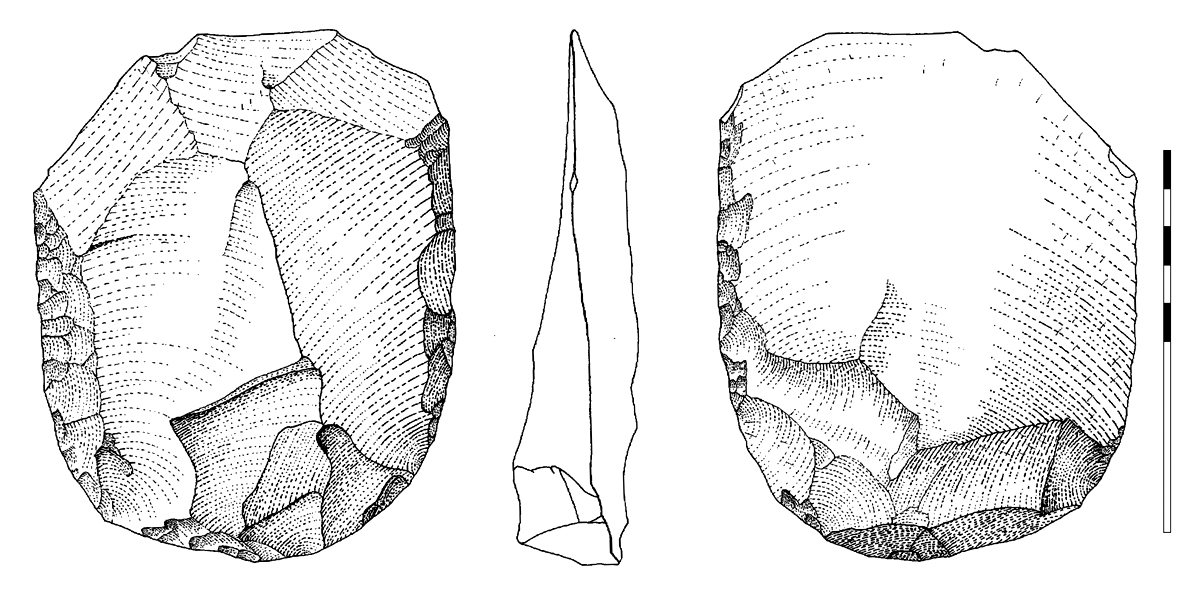 hachereau en quartzite du site acheuléen récent d'Hassi Manda en Algérie ; dessin Vincent Mourre quartzite flake-cleaver from upper acheulean site of Hassi Manda, Algeria ; drawing by Vincent Mourre